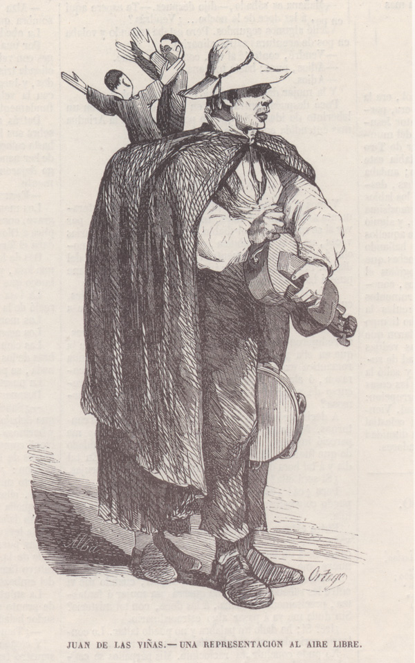 Xilografía (15 x 8,5 cm.) del titiritero Juan de las Viñas. Una representación al aire libre. Fundación Museo de las Ferias. (1860-11-11). "Juan de las Viñas. Una representación al aire libre". El Museo Universal 2.